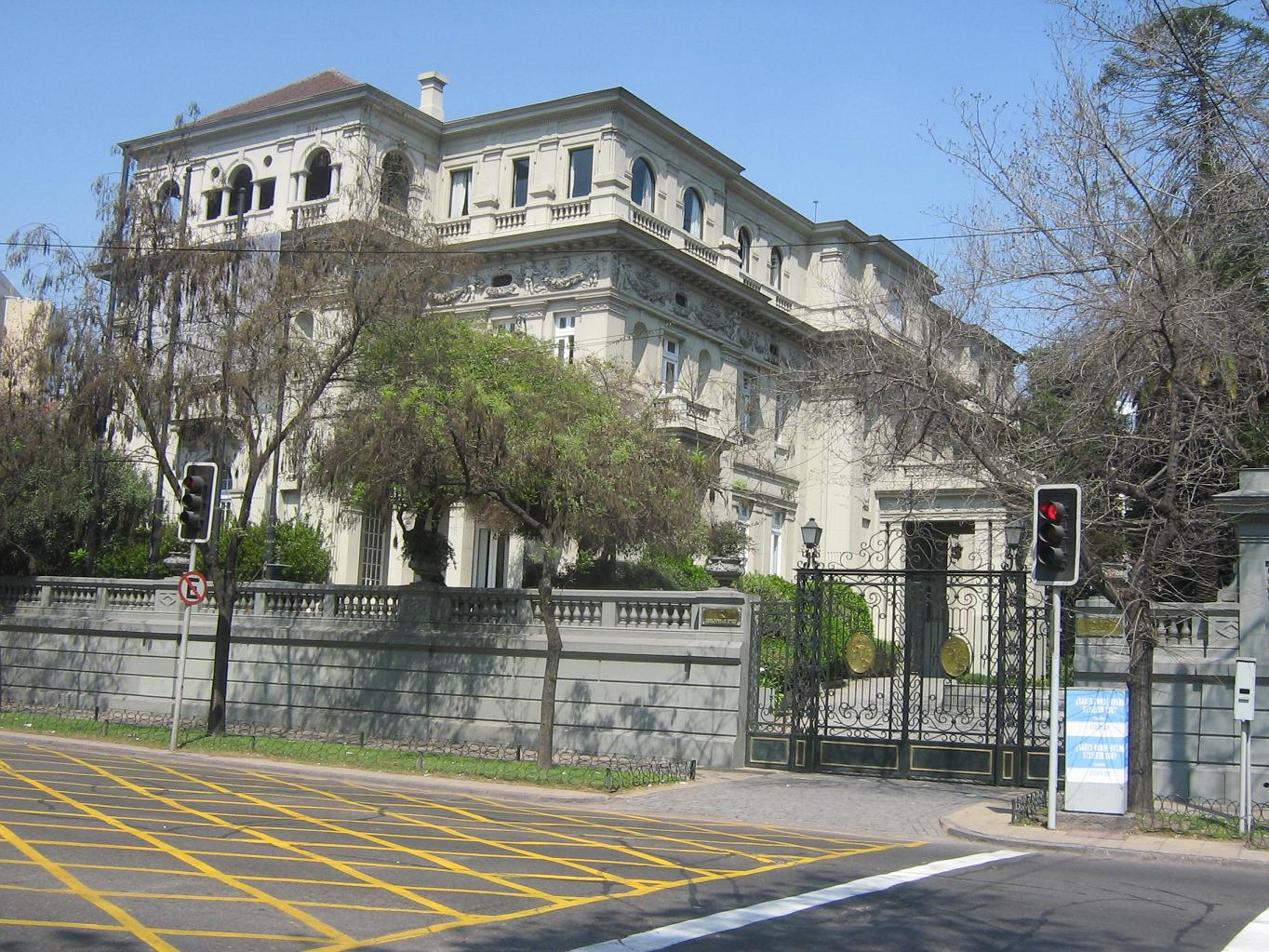 Palacio Bruna, actual propietario Cámara de Comercio, Santiago de Chile